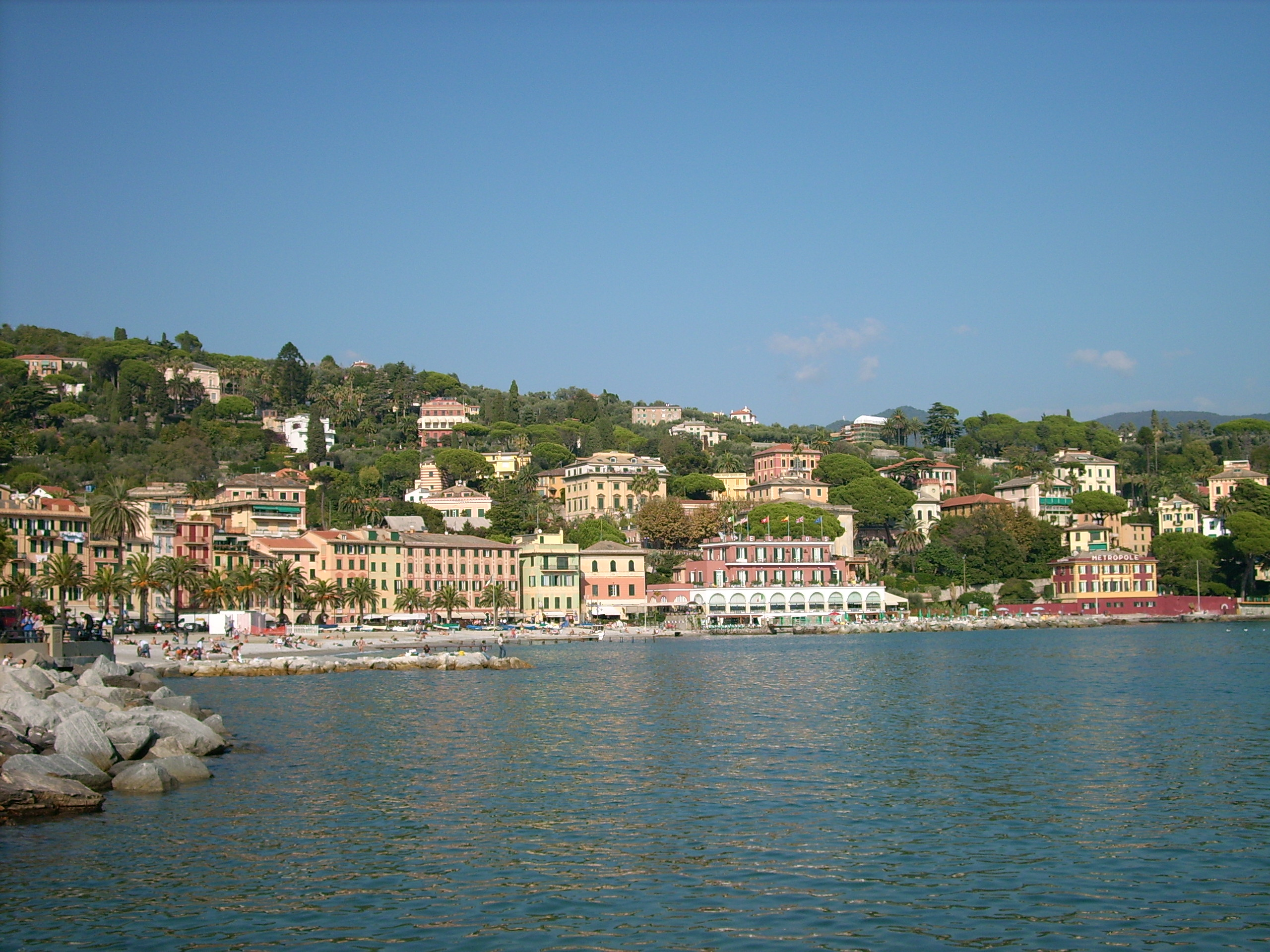 Santa Margherita Ligure, Liguria, Italia